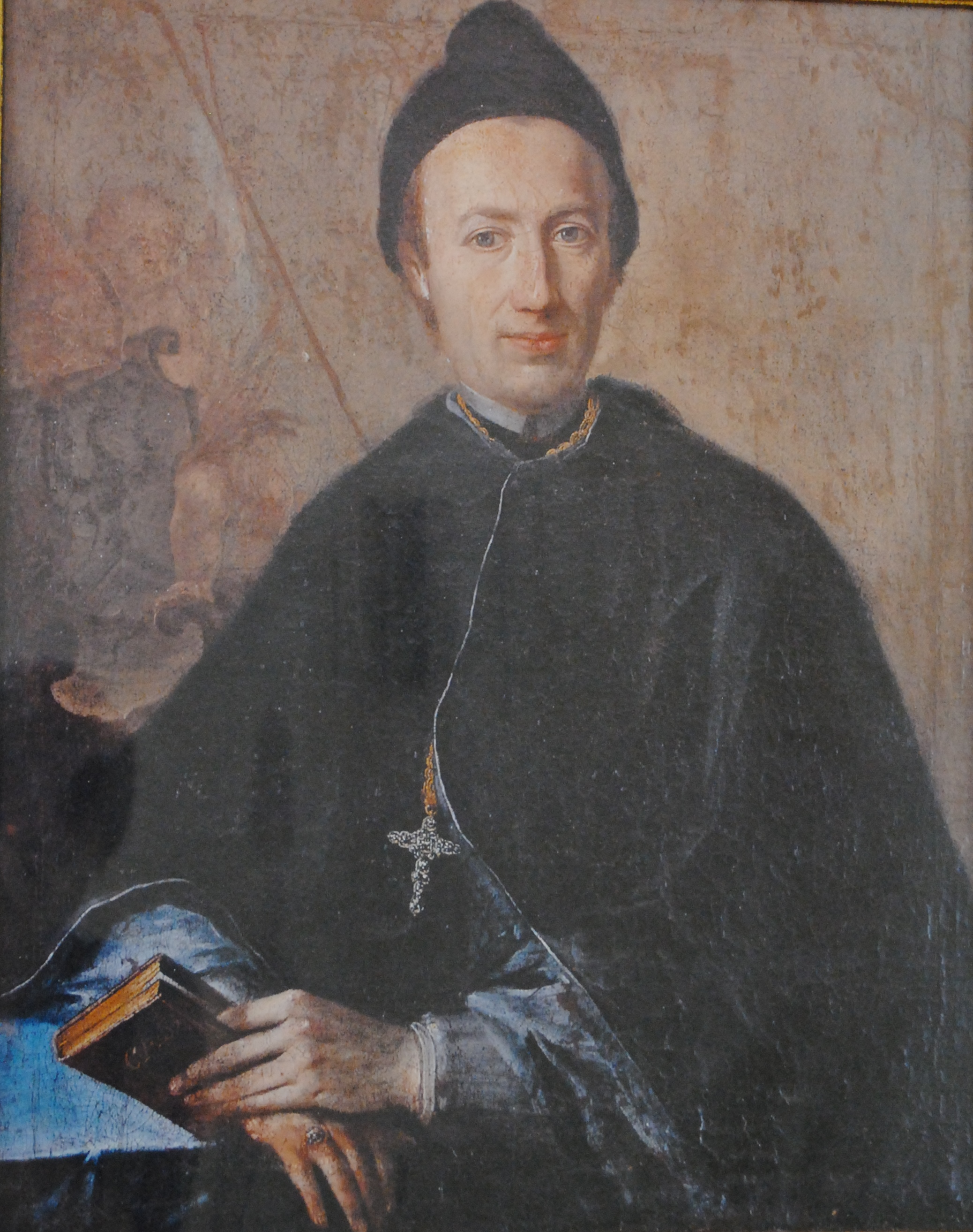 Christoph Balbus, Abt der Abtei Münsterschwarzach, Gemälde in der Nordheimer Zehnthofkapelle, ca. 1755